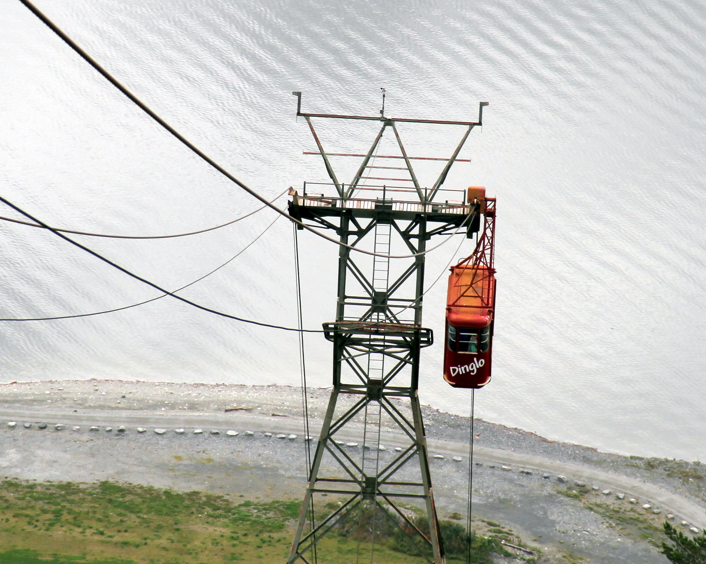 Dinglo på vei opp mot Hanguren.